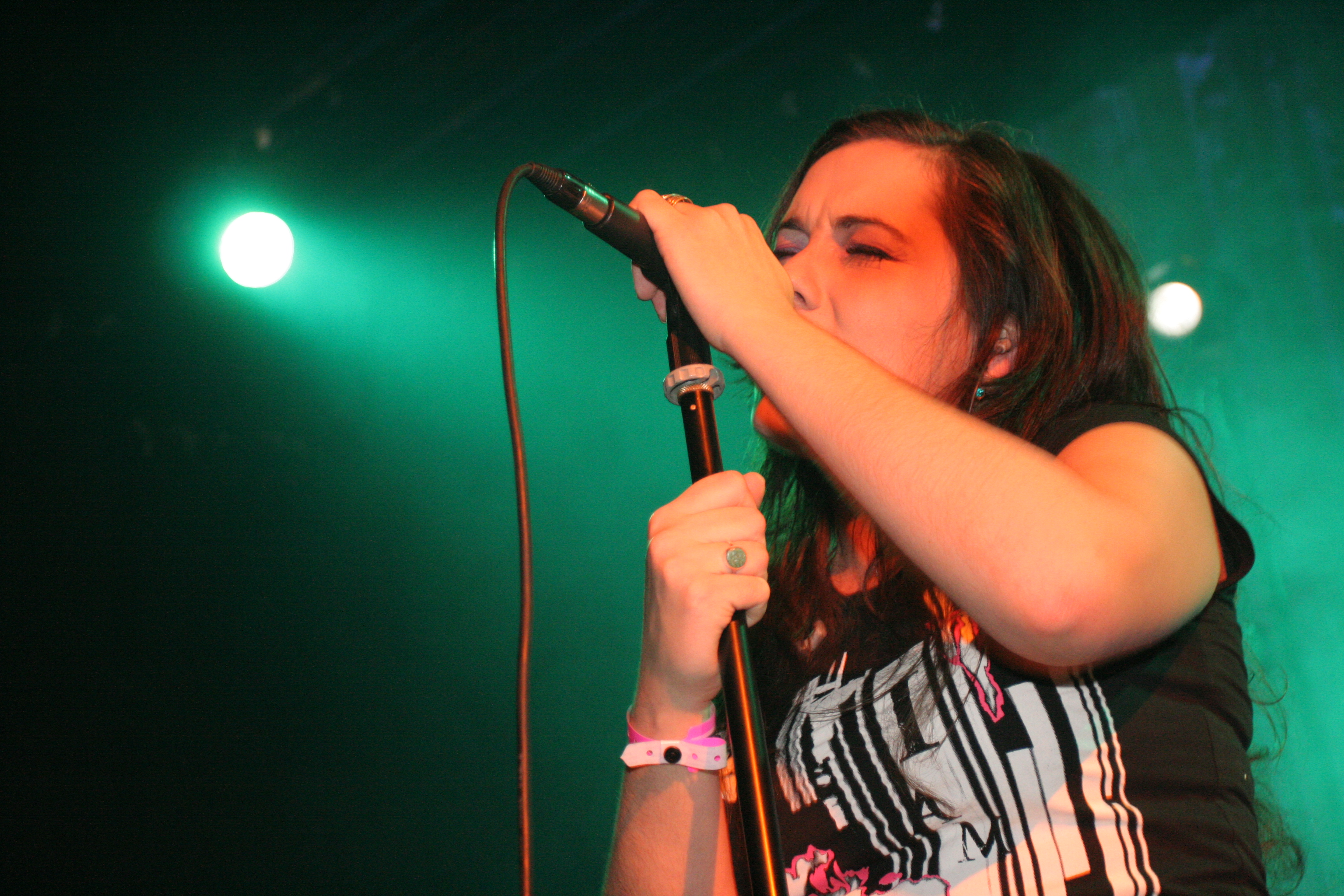 Klára Nemravová, Tata Bojs concert in Prague club Delta